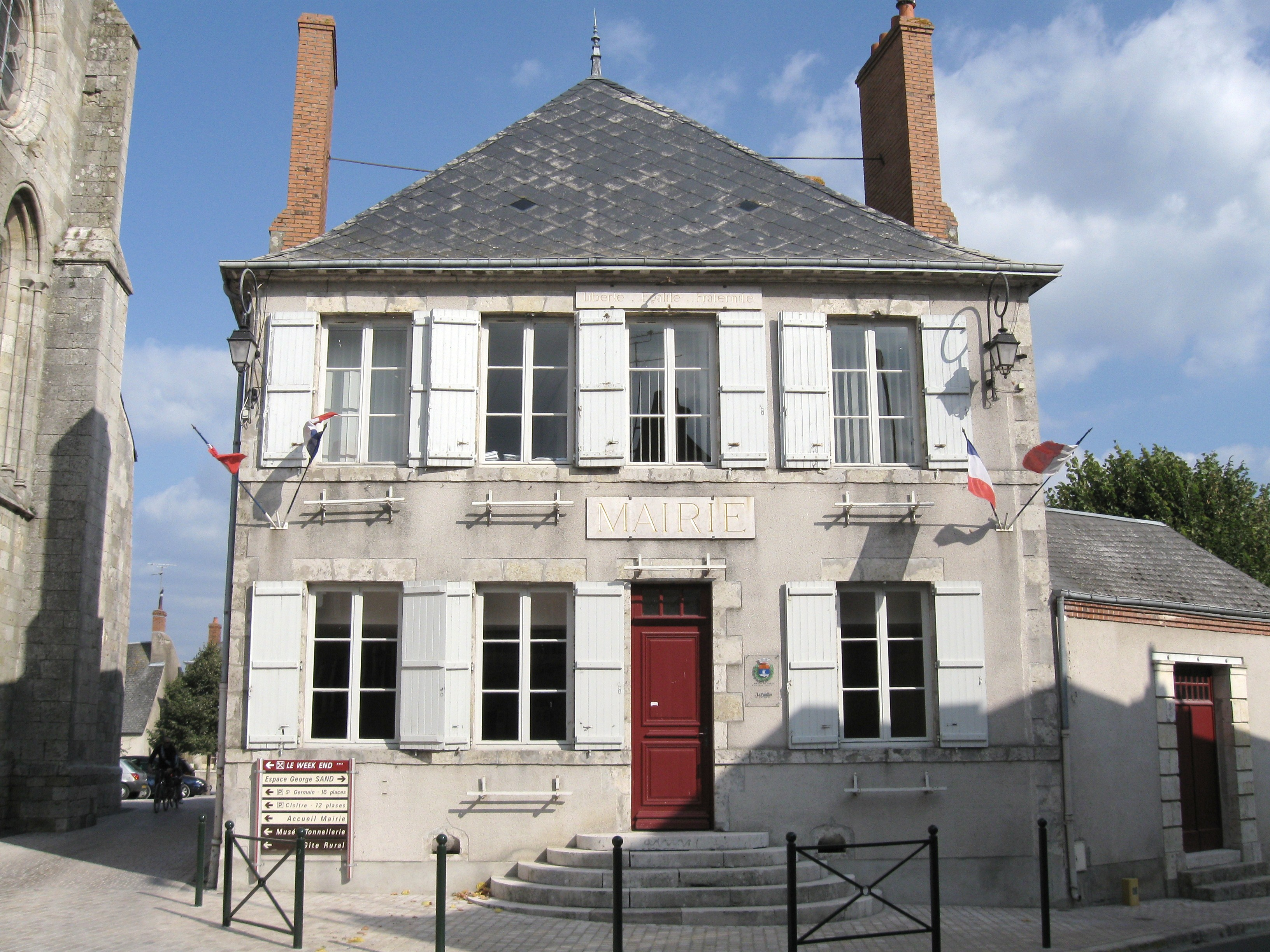 Mairie de Chécy, Loiret, France